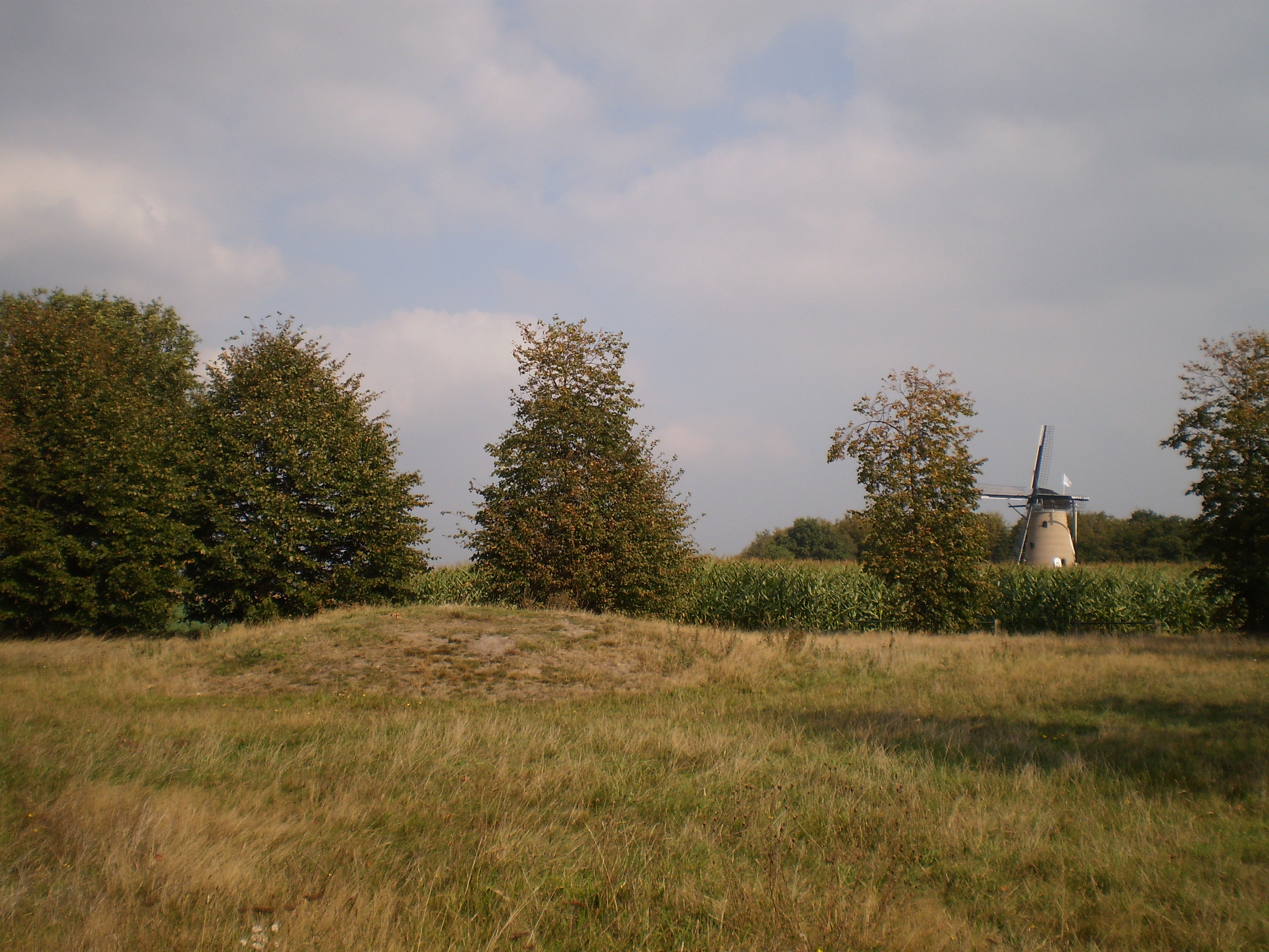 Engeberchje op de Soester Eng.